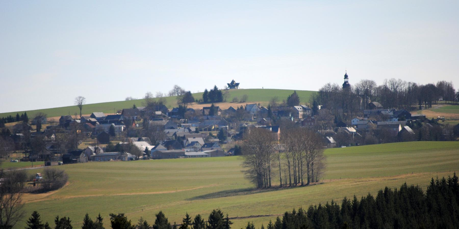 Markneukirchen, OT Landwüst, Ansicht aus Richtung Sträßl